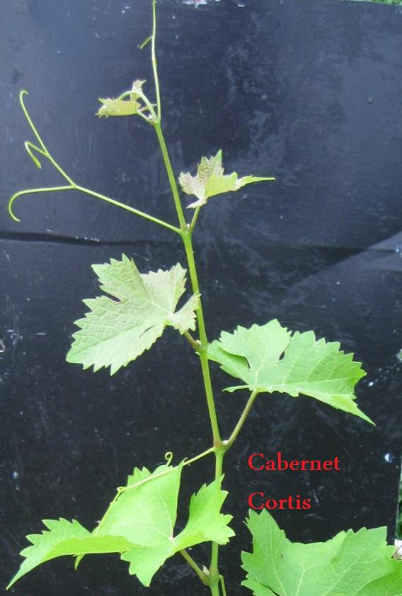 Koronka winorośii Cabernet Cortis